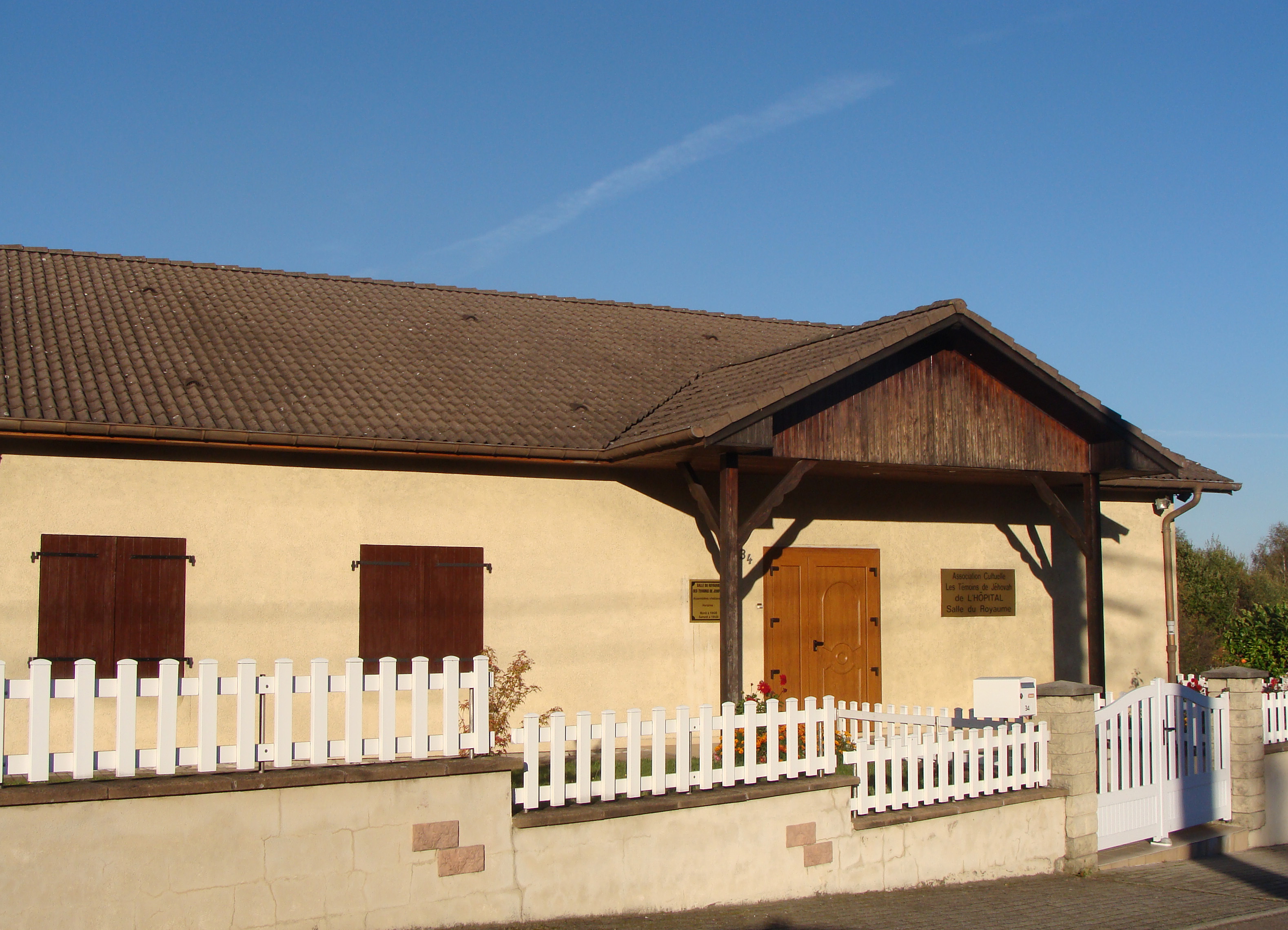 Salle du Royaume (Témoins de Jéhova) située rue du Moulin à L'Hôpital (Moselle)